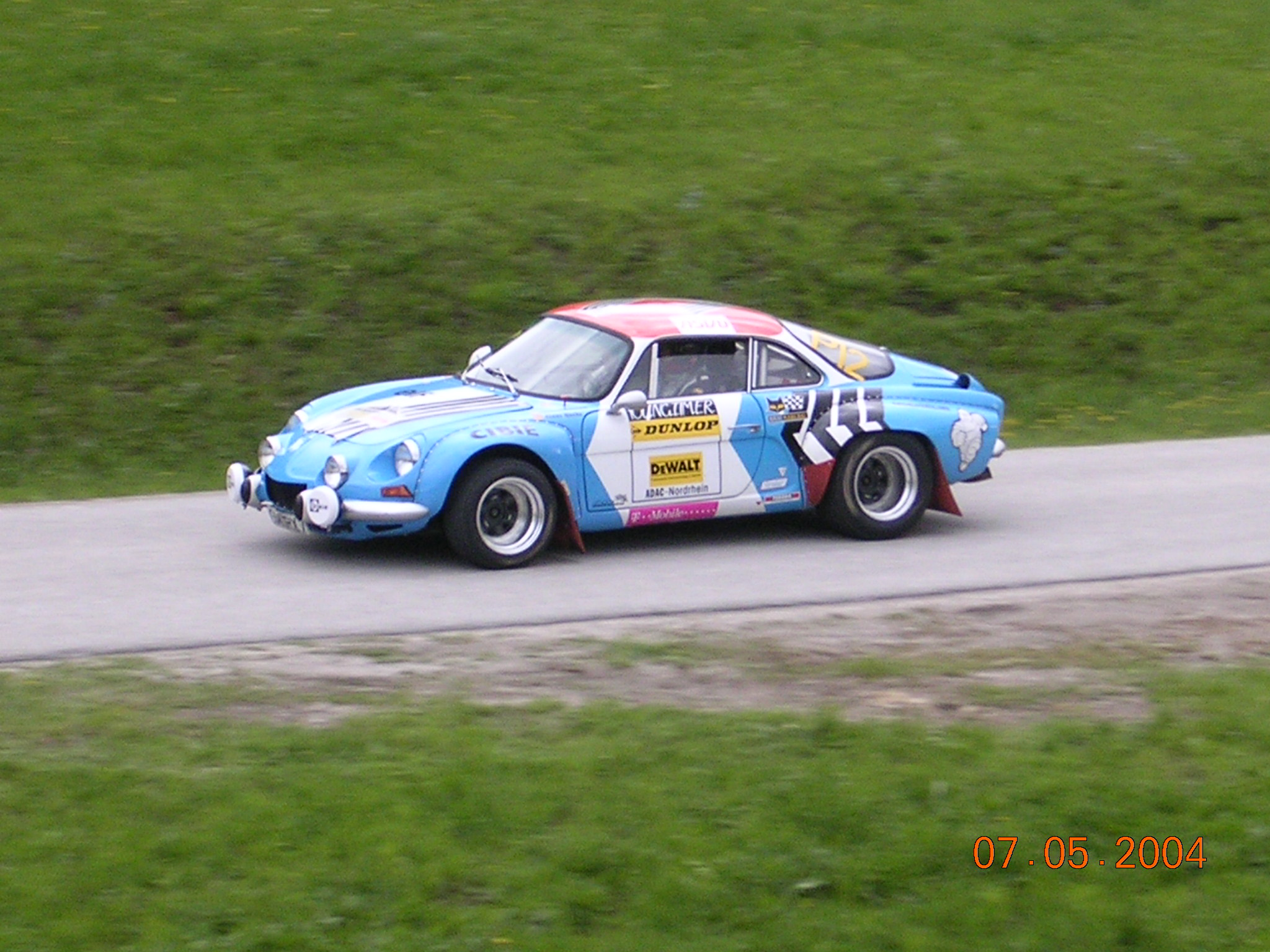 blaue Renault Alpine